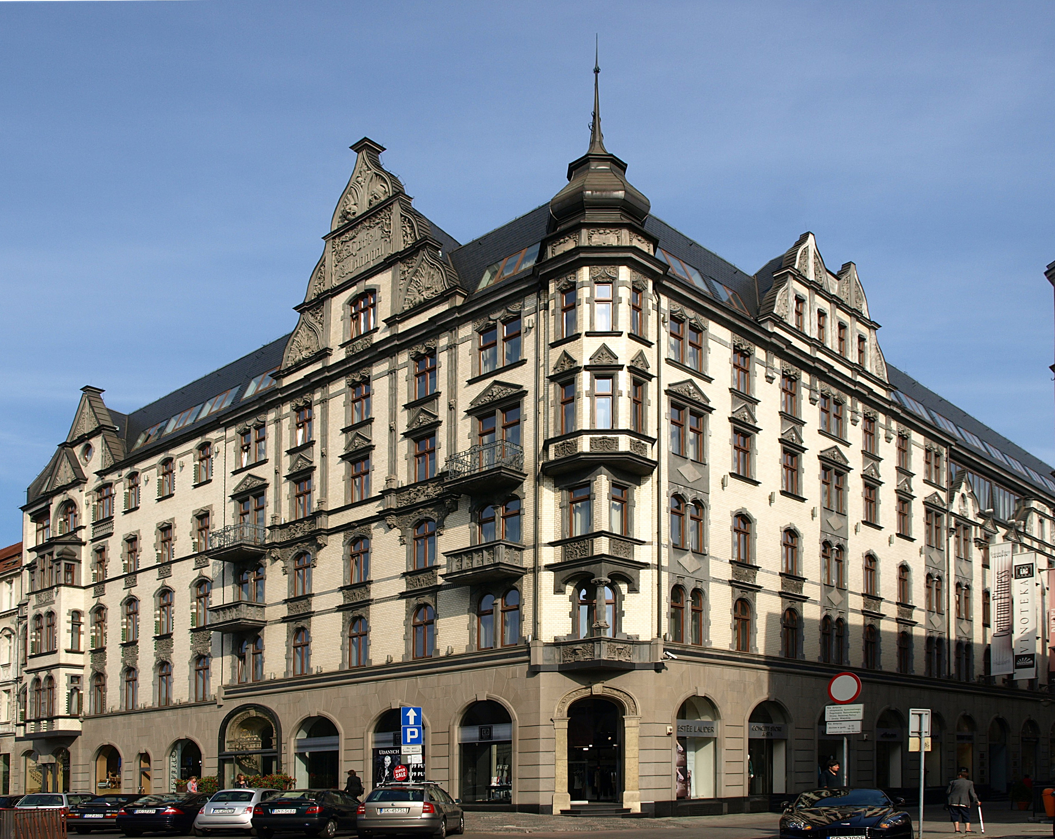 Zabudowania dawnego Hotelu "Monopol" Katowice, ul. Dworcowa 5 i 7ul. Dyrekcyjna 2, Katowice (zabytek nr A/1526/93)